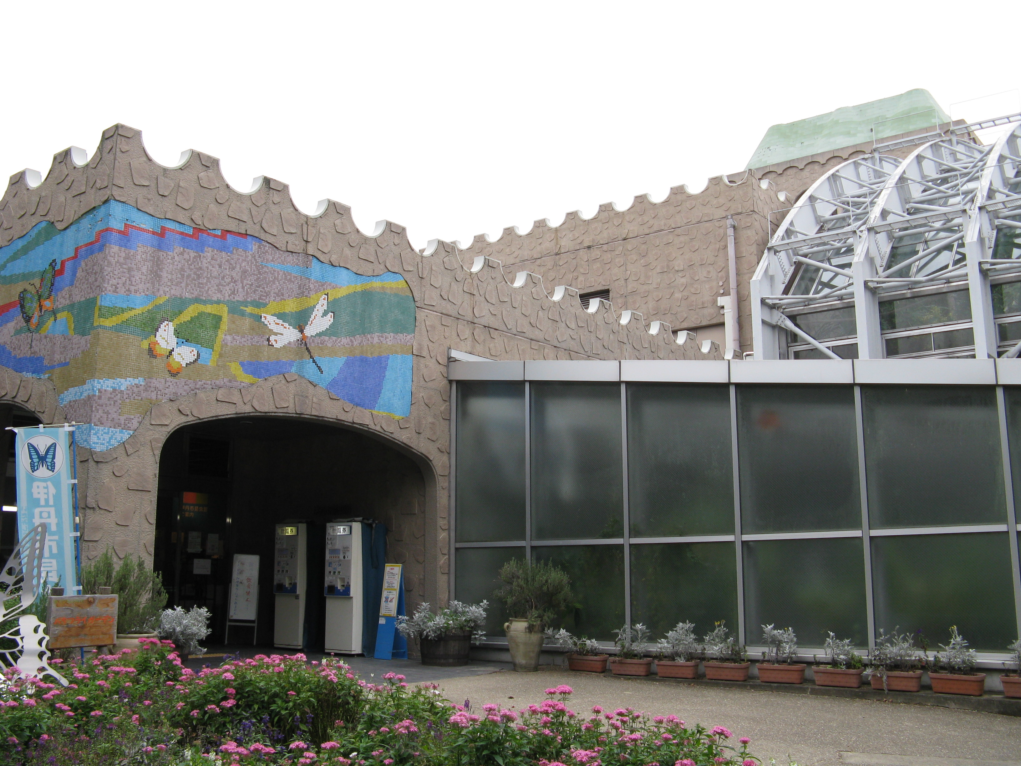 伊丹市昆虫館